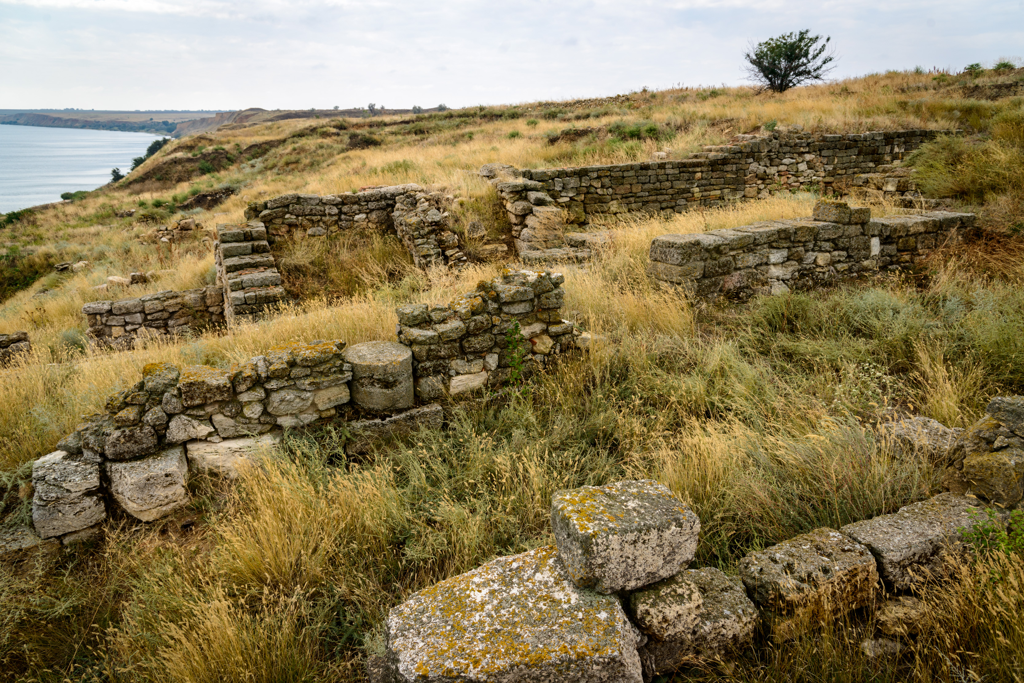 Стародавнє місто Ольвія, Парутине, вул. Ольвійська, 47а